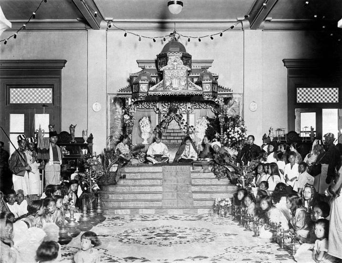 Repronegatief. Plechtigheden bij de kroning van de Sultan van Deli in 1925: op de troon de sultan en zijn echtgenote met aan weerszijden de rijkssieraden